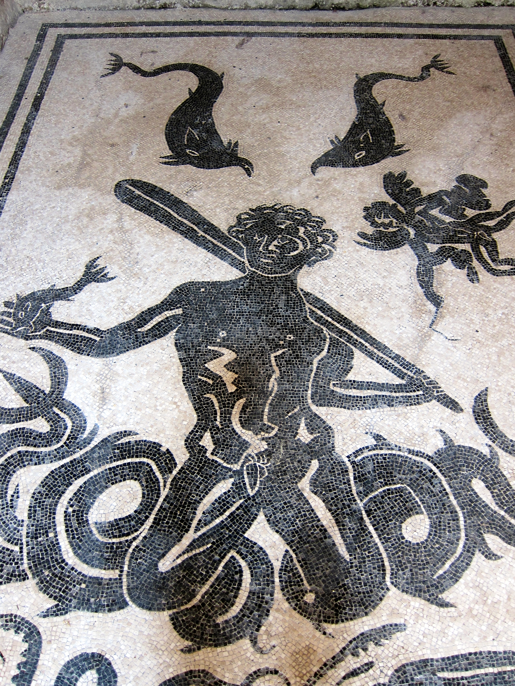 Mosaïque au sol de l'apodyterium des terme femminili à Herculanum.